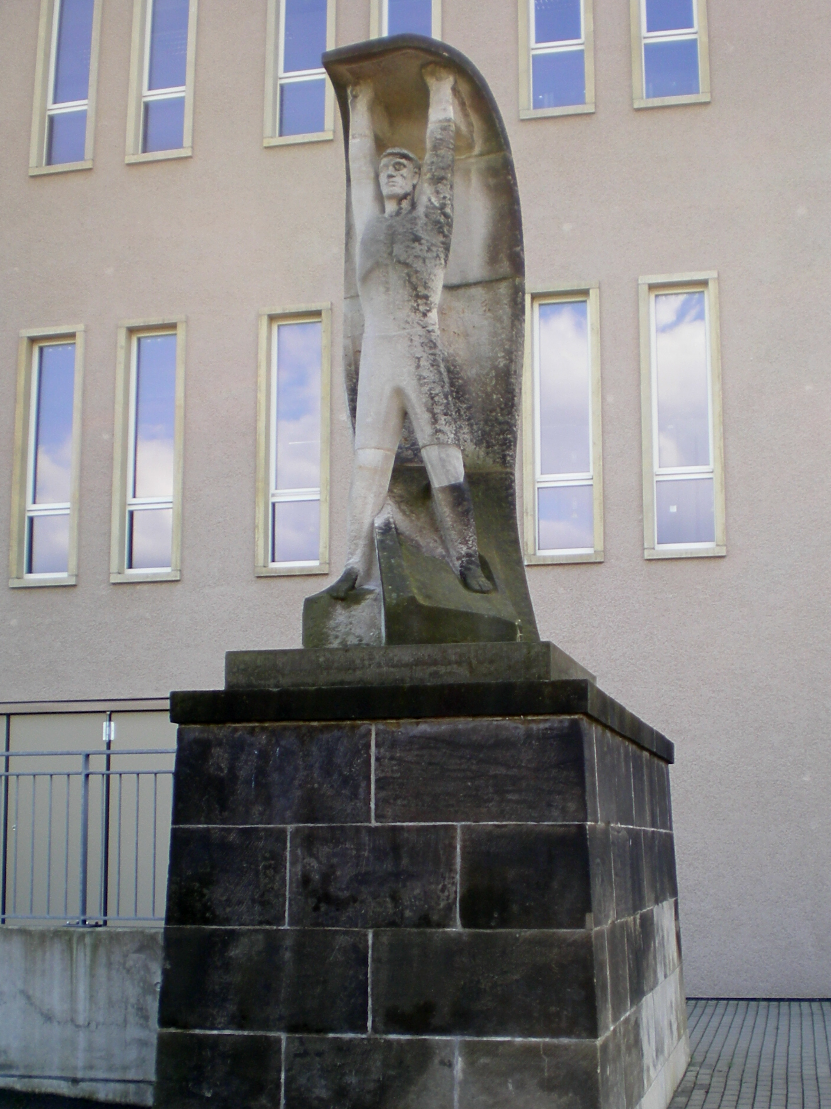 Karl Lüdecke – 1959-1960 Bändigung des Wassers, Sandstein, Standort: ursprünglich vor dem (ehemaligen) Wasserstraßenamt, Ostra-Allee, seit 2002 TU Dresden, Zellescher Weg